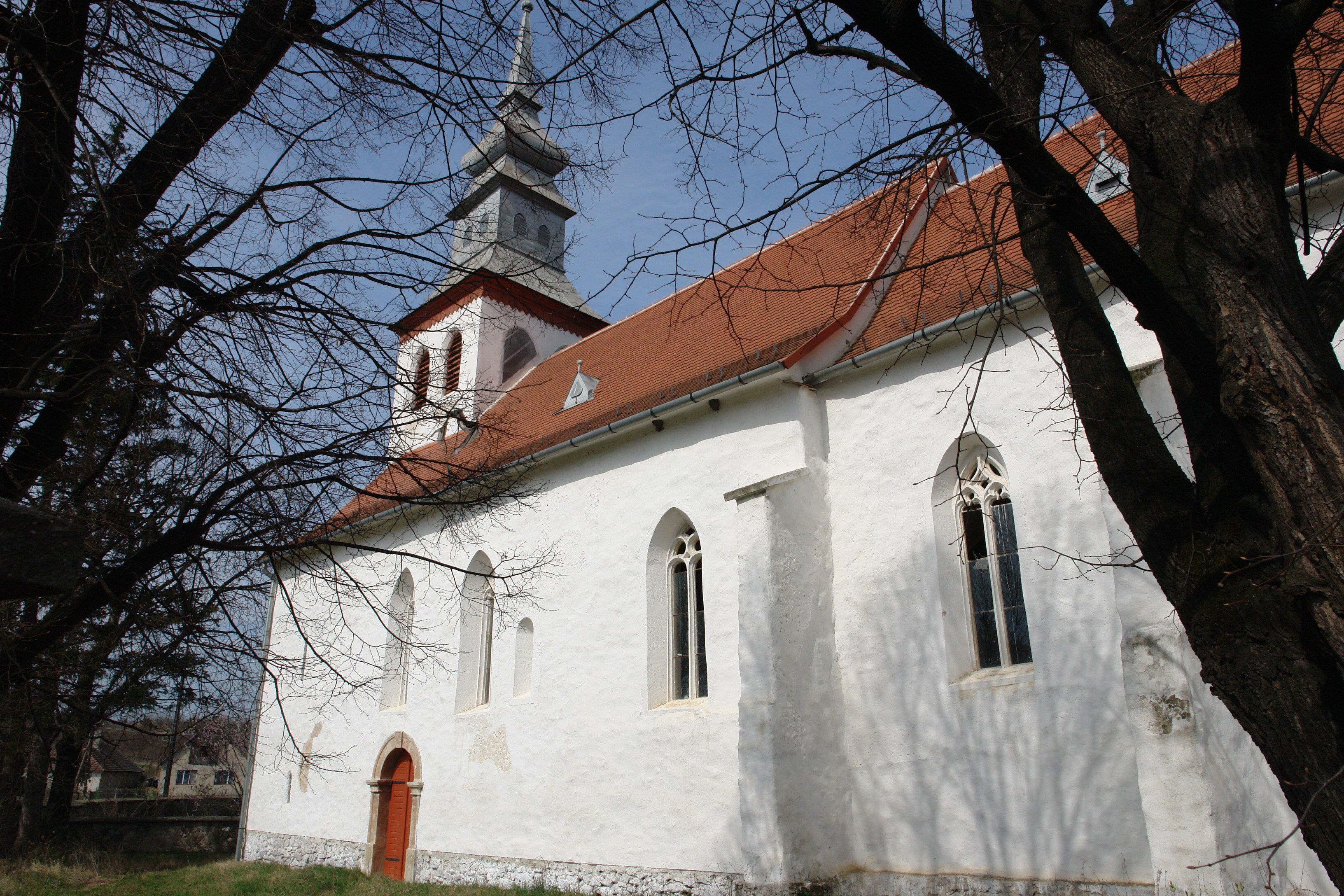 Korát középkori református temploma This is a photo of a monument in Hungary, Identifier: 2862